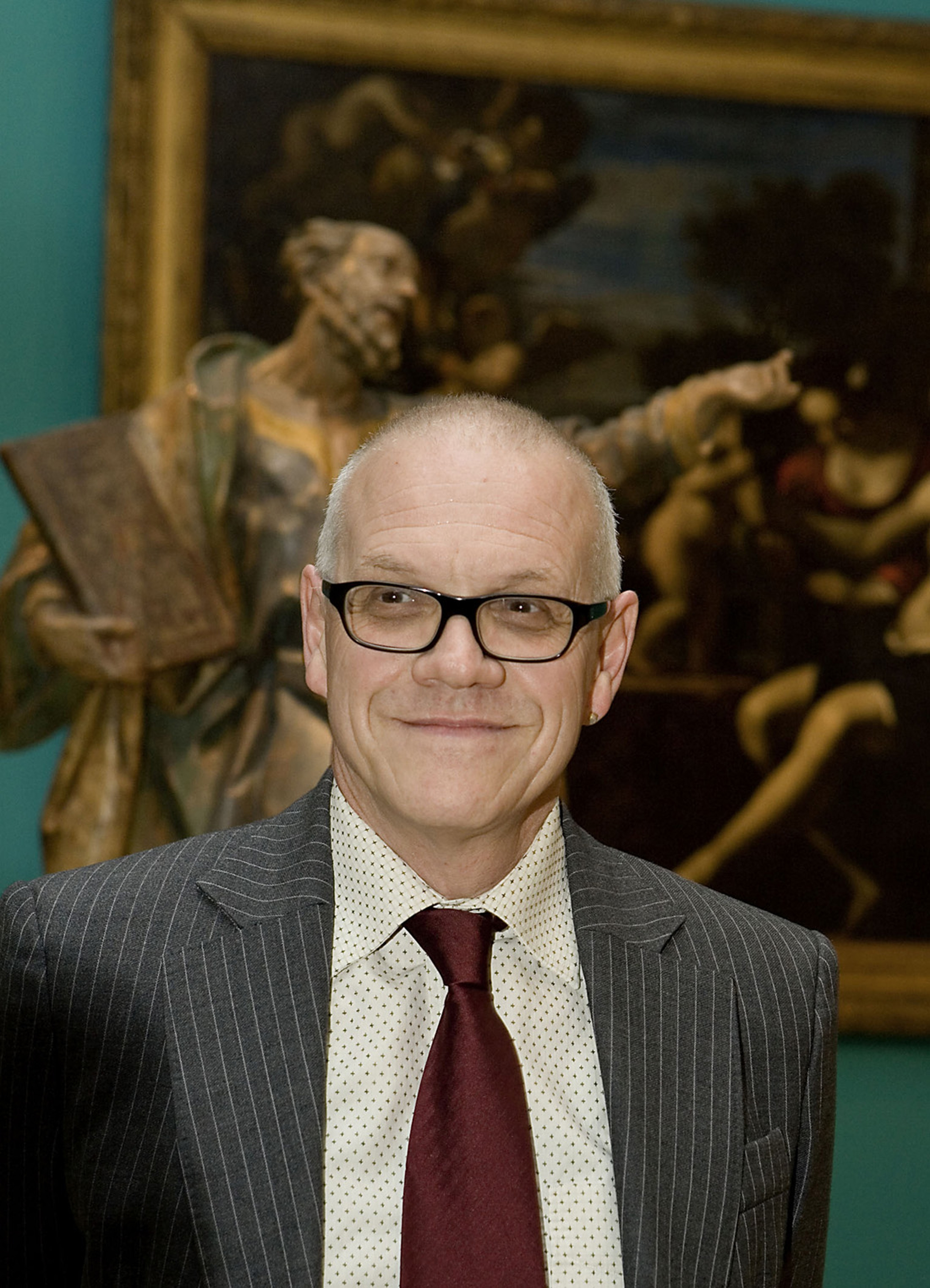 Foto von Beat Wismer